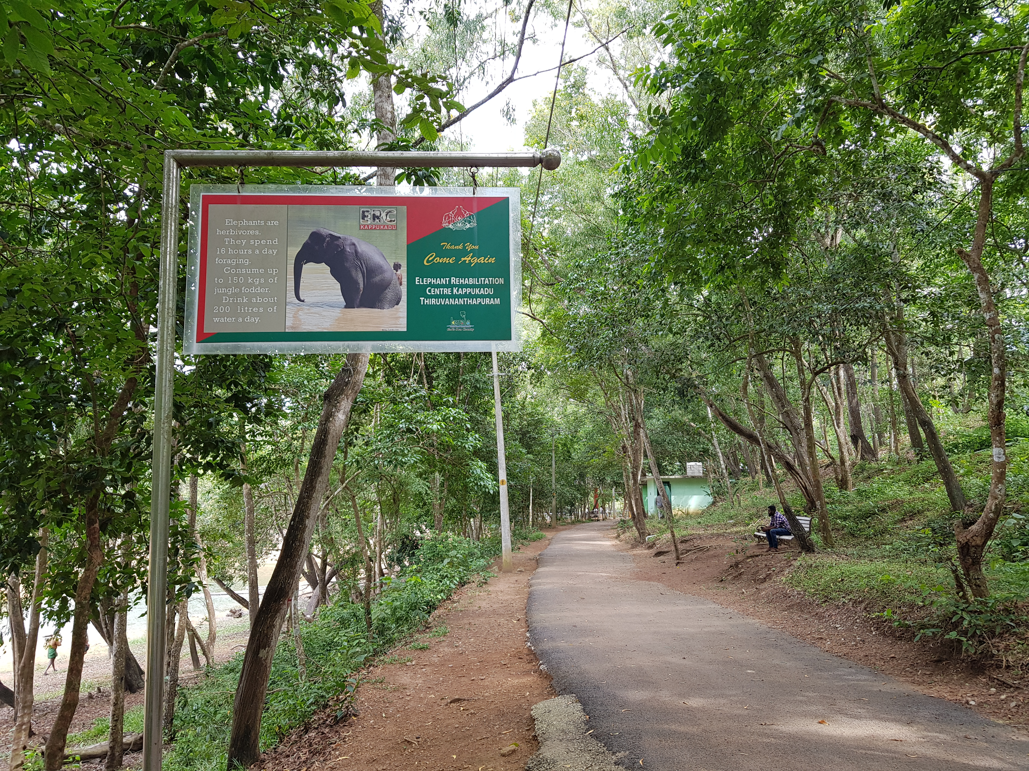 Kappukadu Road